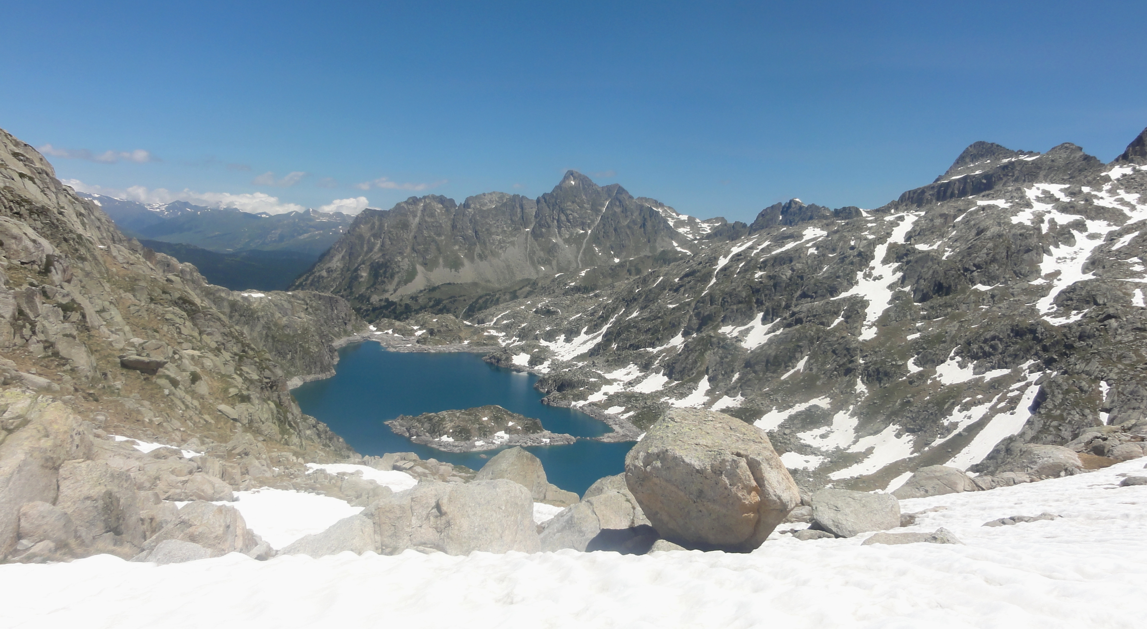 Estanh de Mar i el Montardo desde la colhada d'Estanh de Mar This is a a photo of a natural area in Catalonia, Spain, with id: ES510081